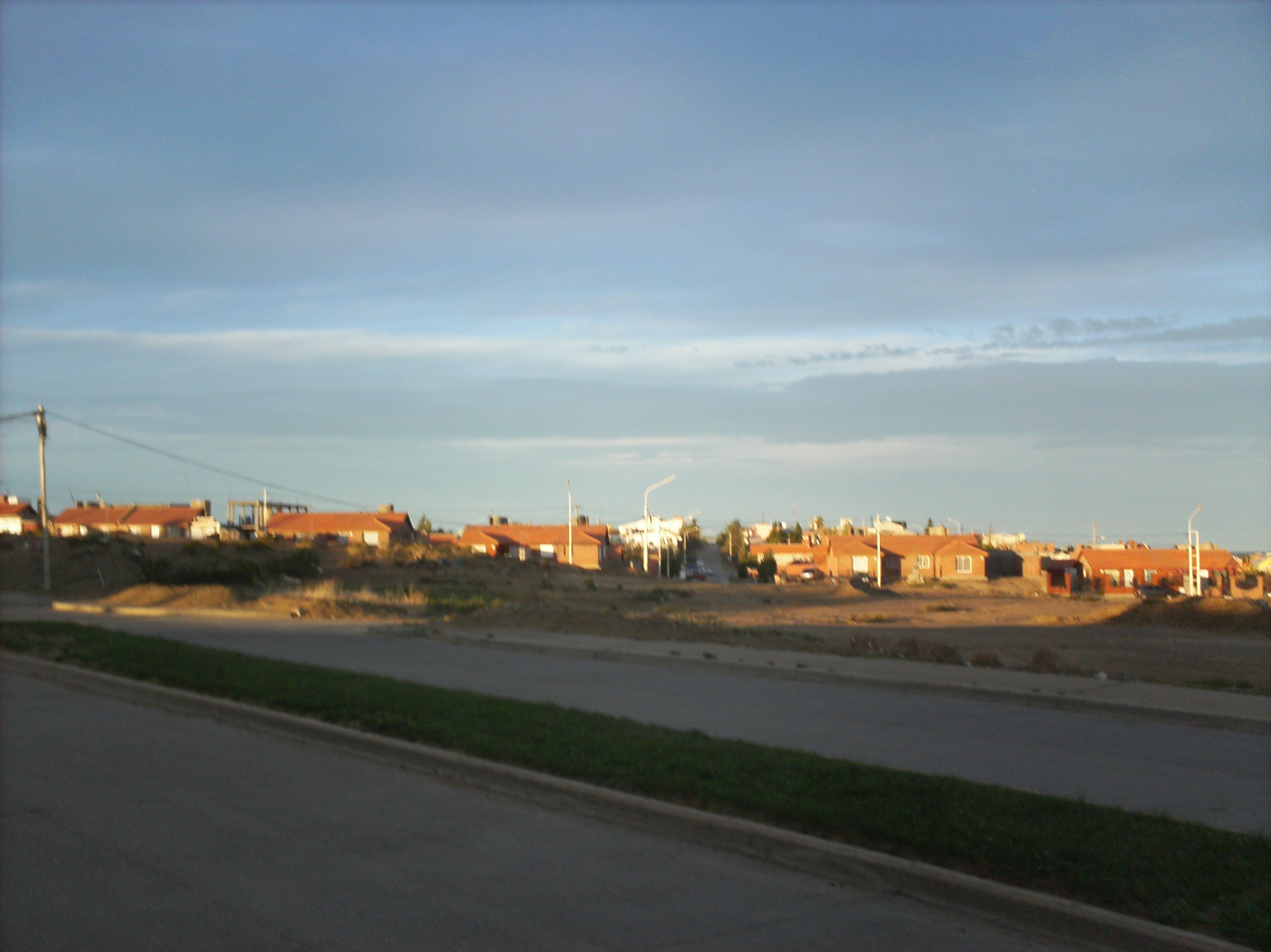 vistas de las casa en la entrada a la ciudad del gorosito